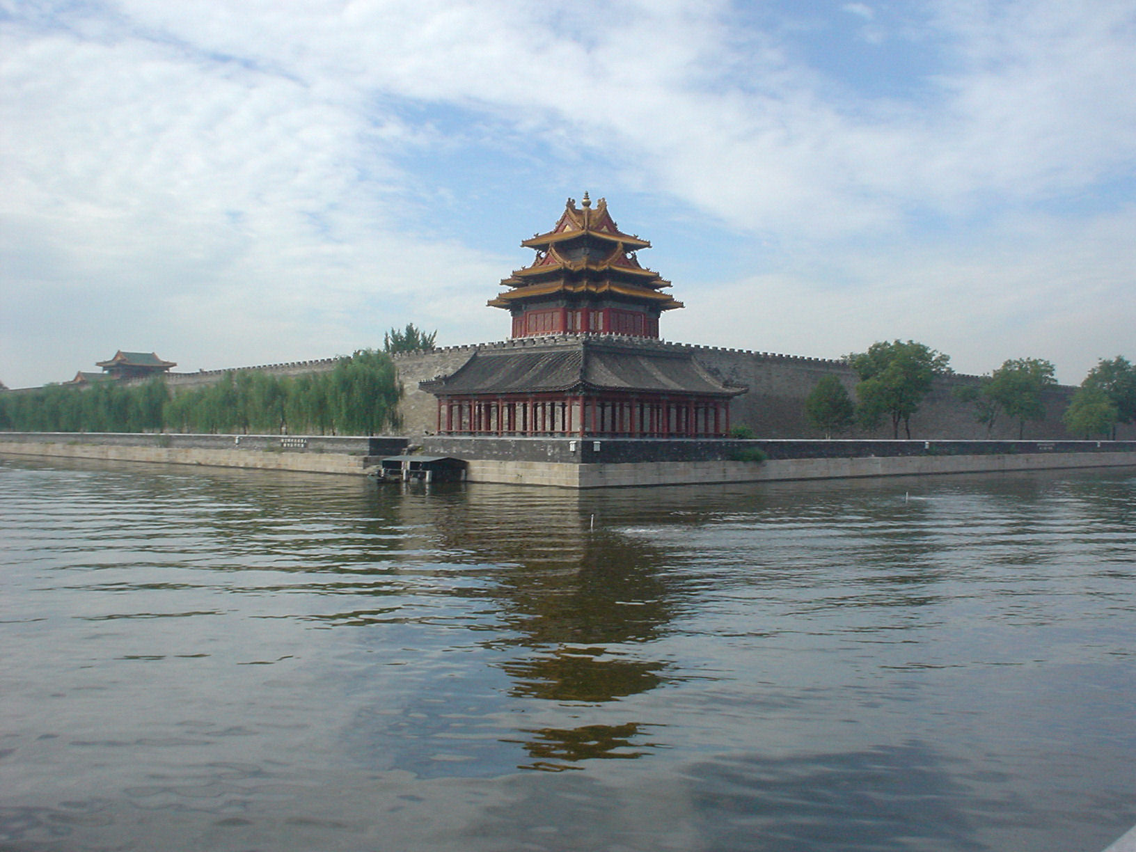 Forbidden Palace, Beijing